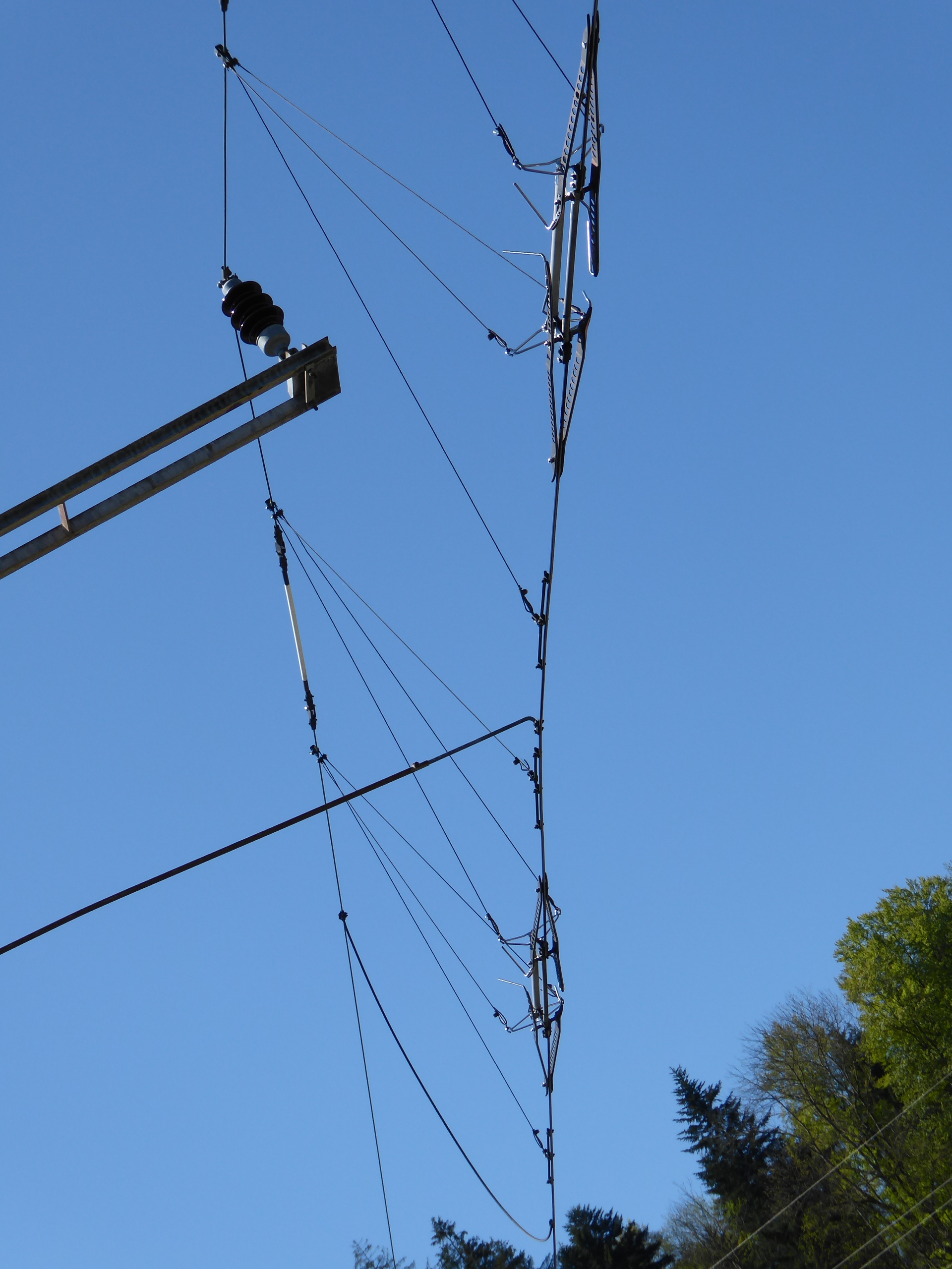 Fahrleitungstrennstelle unmittelbar vor dem Nordportal des Rickentunnels bei Wattwil SG.